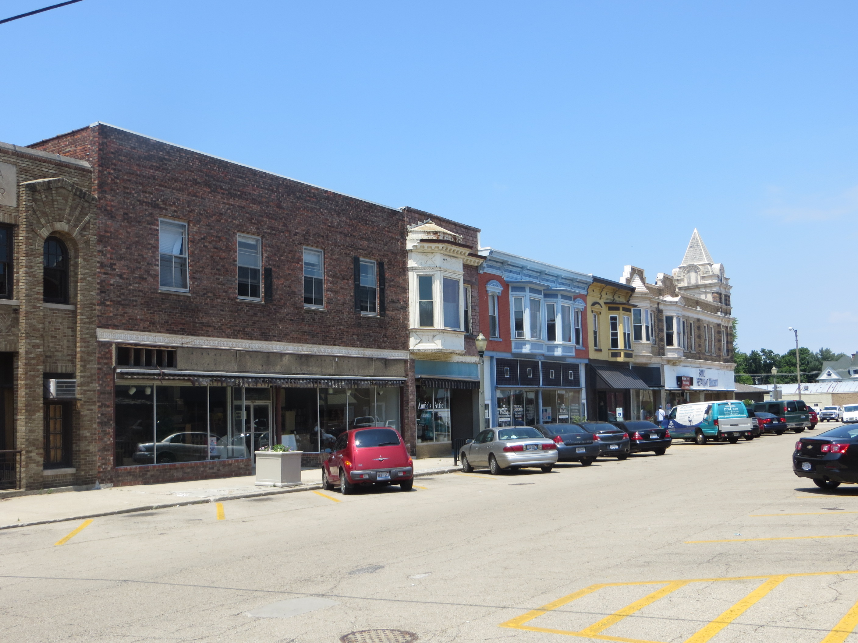 Illinois Avenue in Mendota, Illinois.